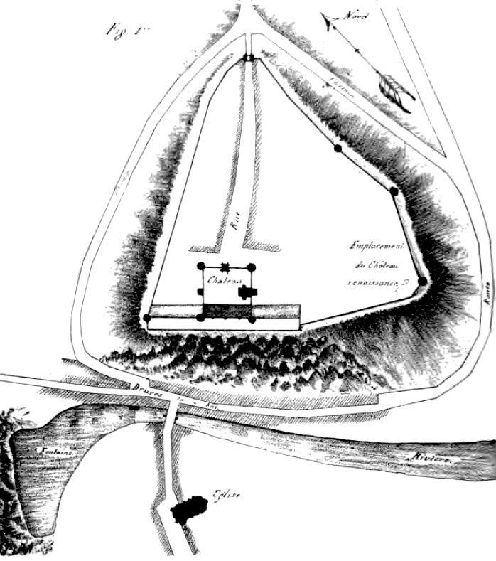 Plan du village et du château de Druyes, Yonne